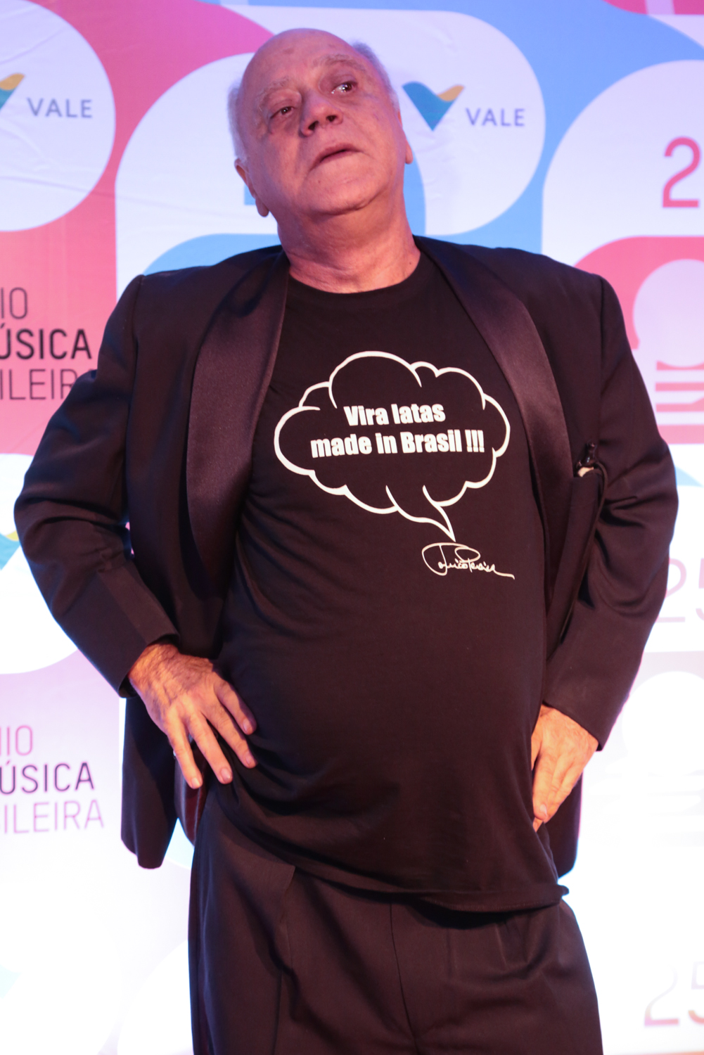 Tonico Pereira durante o 25º Prêmio da Música Brasileira no Theatro Municipal. Foto: Reginaldo Teixeira (14/05/14)